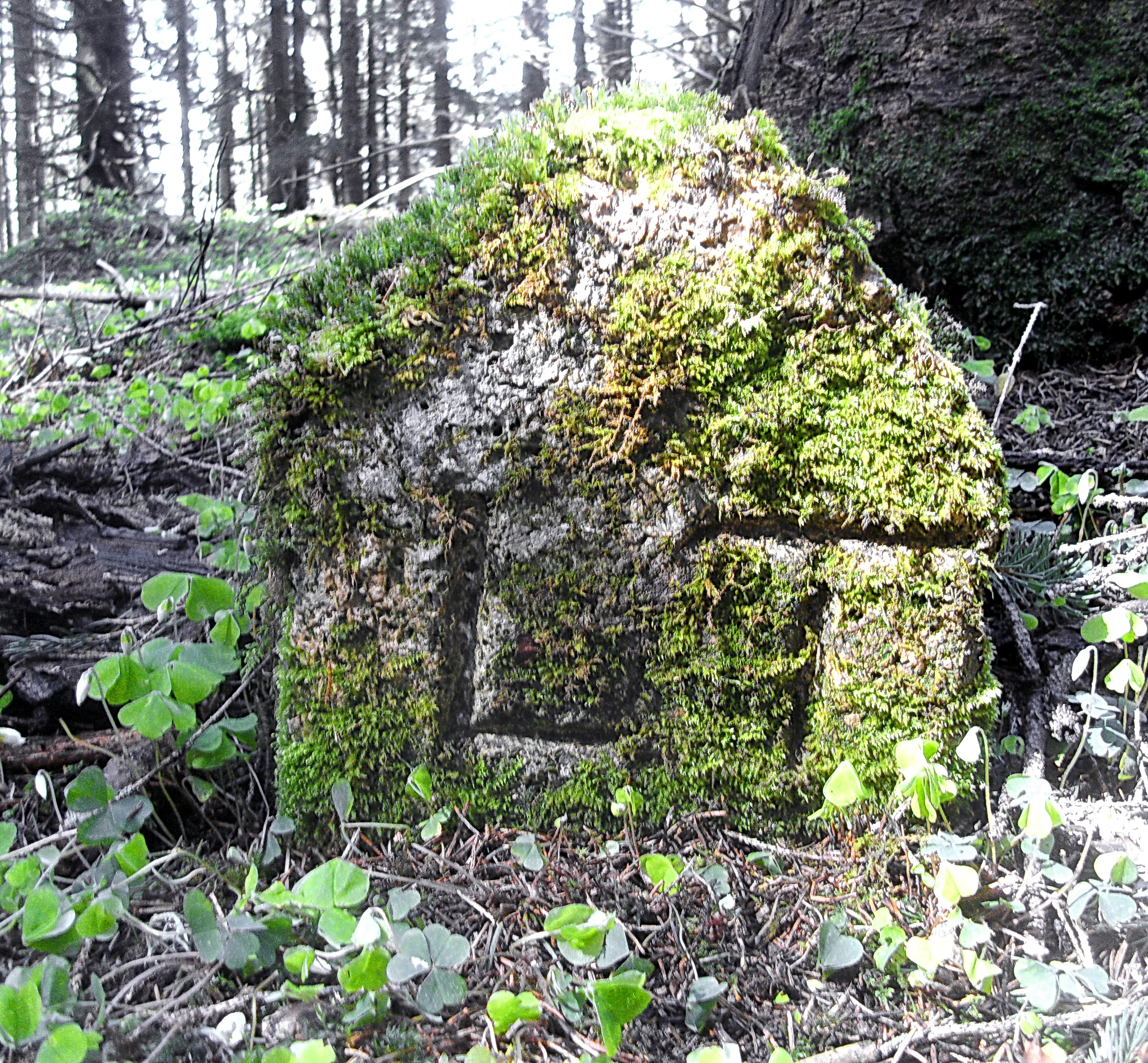 Grenzstein des Landgerichts Tölz zum Kloster Tegernsee auf dem Gronetseck